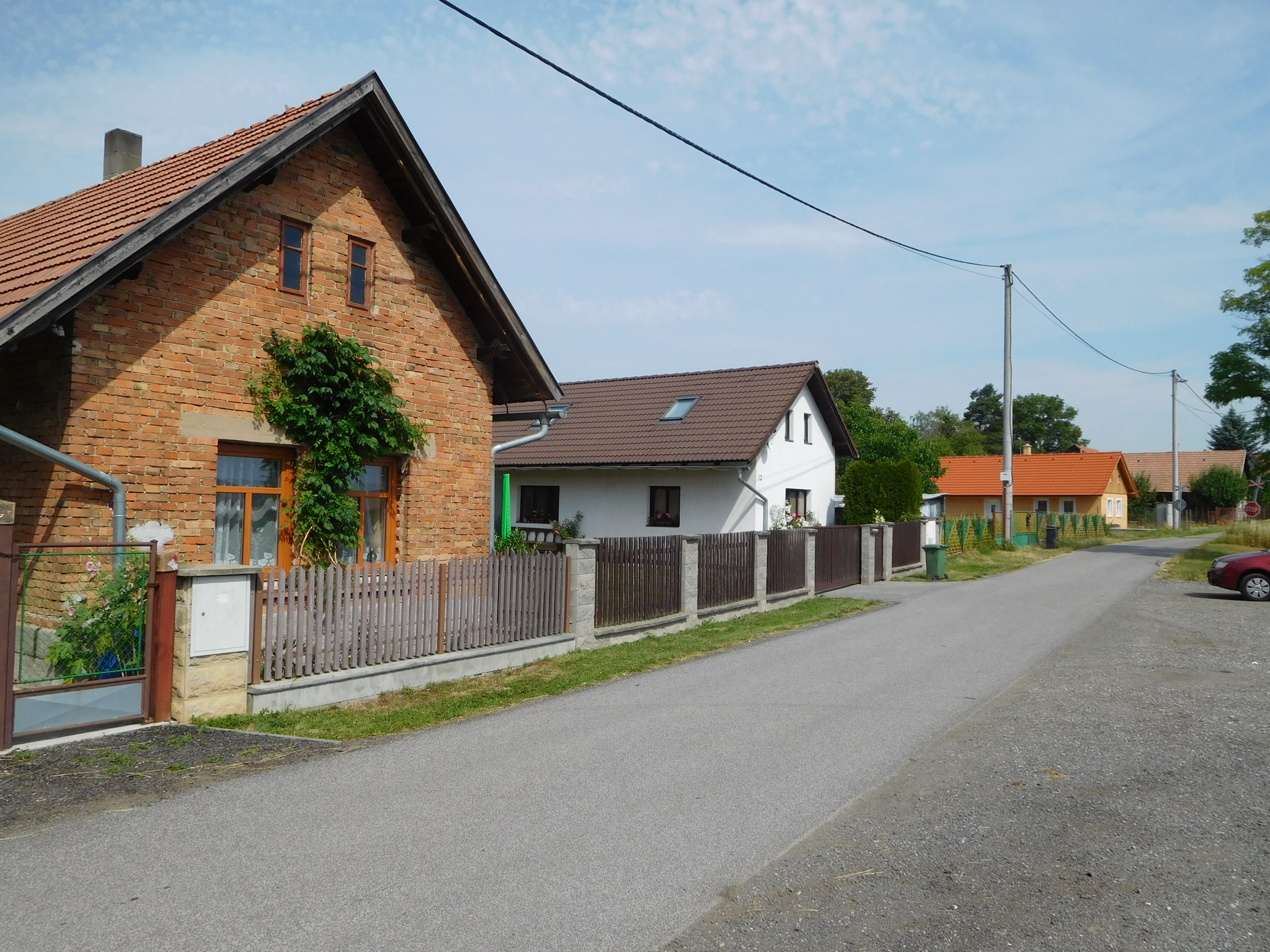 Kozodírky - severní část